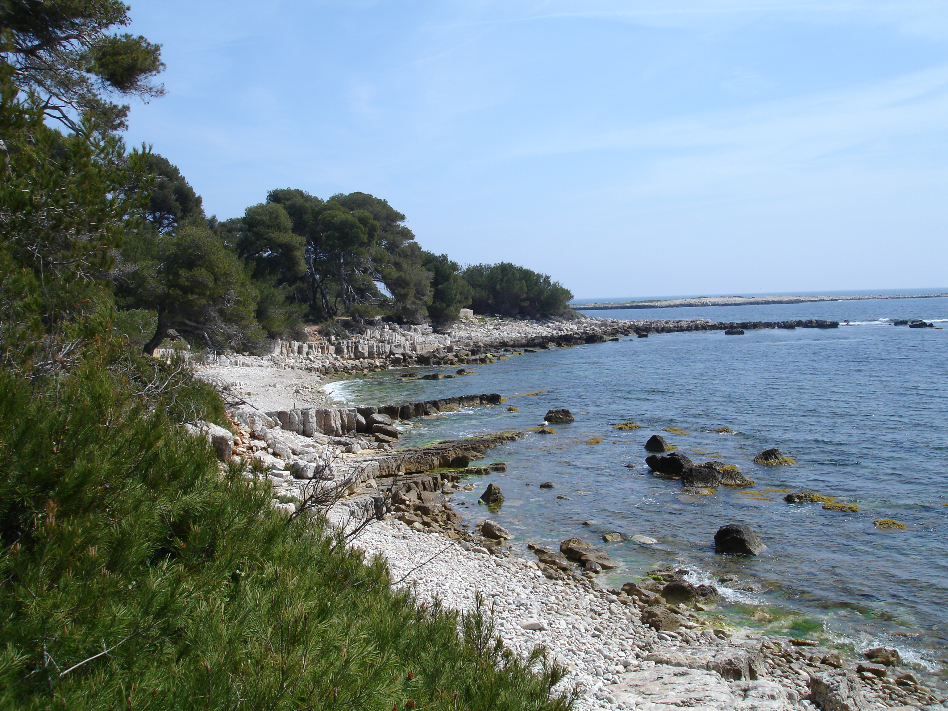 Littoral sud de l'île Sainte-Marguerite au large de Cannes / Southern littoral on île Sainte-Marguerite off shore from Cannes